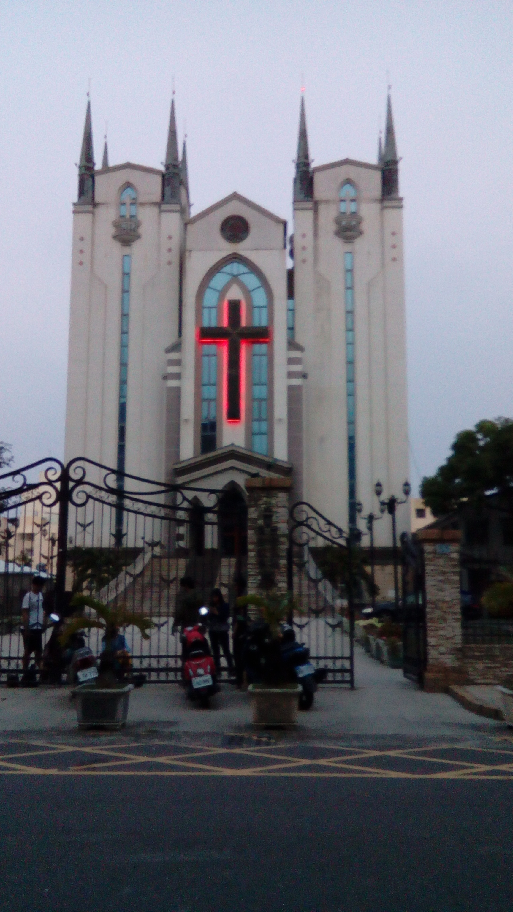 位於鳳山區中正路 近光復路口